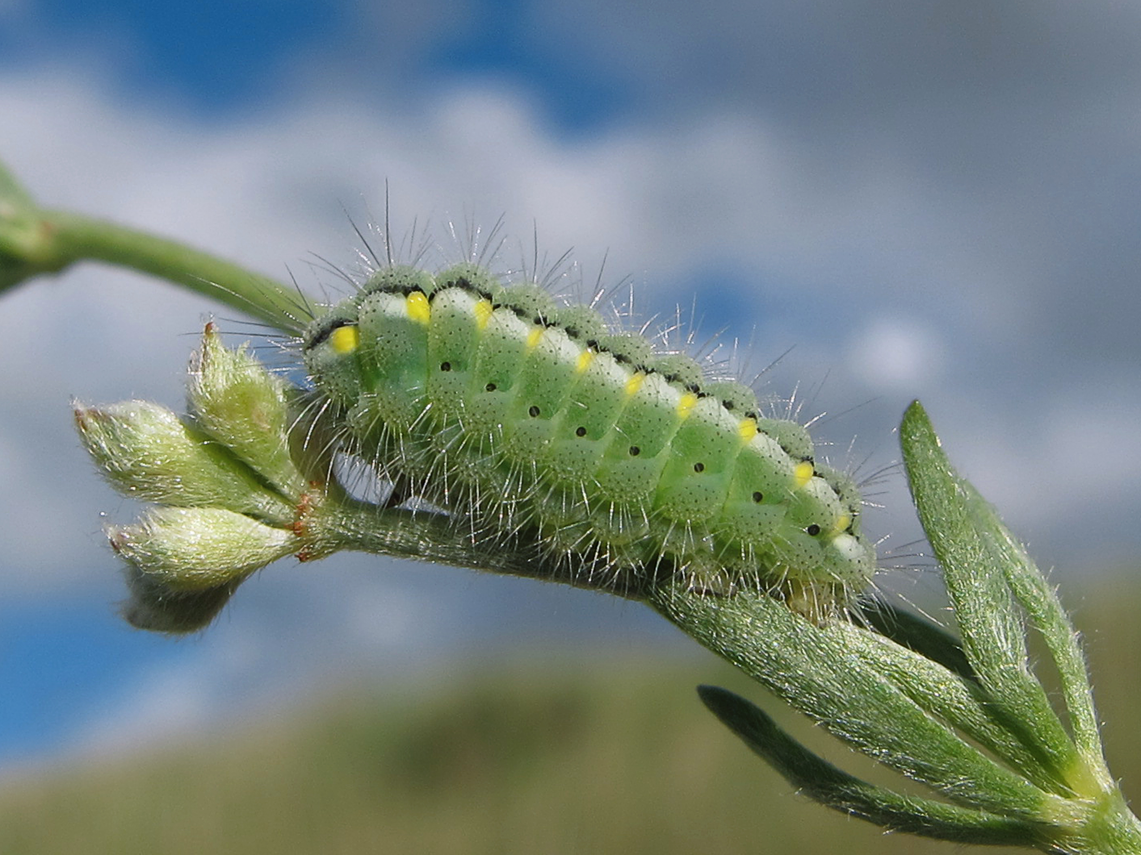 La oruga se alimenta Dorycnium pentaphyllum, también de Lotus. De Zygaena occitanica habita garrigas, matorrales, pastizales secos, laderas de las montañas, curos de ríos secos, bosques muy dispersos y matorrales. donde se encuentre su planta nutricia. Las larvas son fáciles de ver sobre los arbustos de Dorycnium. Las mariposas son de poco mas de 2 cm. de color muy variable, azul-negro con 5 machan rojas rodeadas de blanco y una mancha en forma de luna blanca en la punta.Vuelan en julio y agosto. De Zygaena occitanica es casi exculsiva de la Península Ibérica